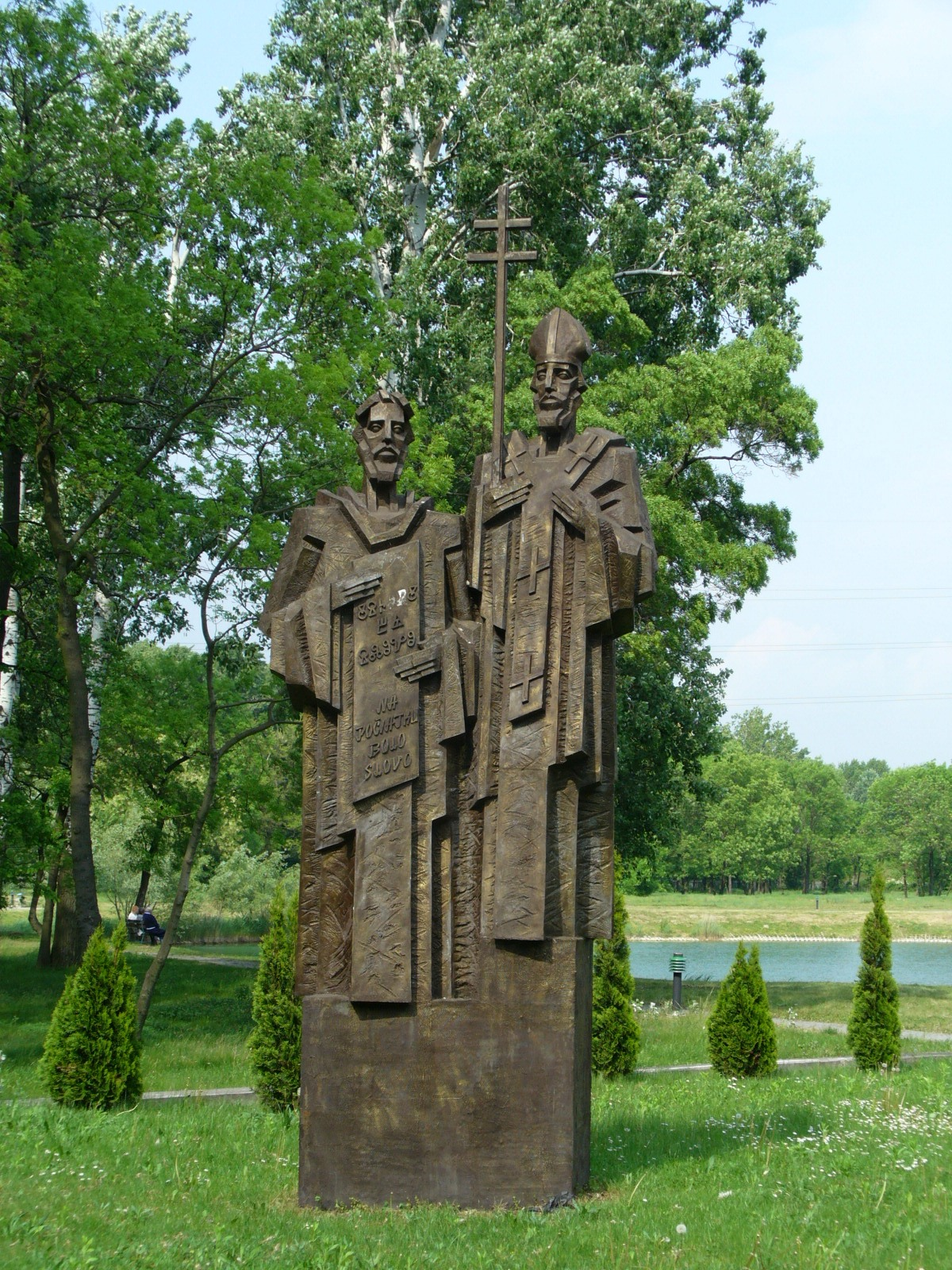 Epoxidová skulptúra sv. Cyrila a sv. Metóda v areáli fakultnej nemocnice Cyrila a Metóda na Antolskej ulici v Petržalke. St. Cyril and St. Methodius statue, Bratislava, Slovakia